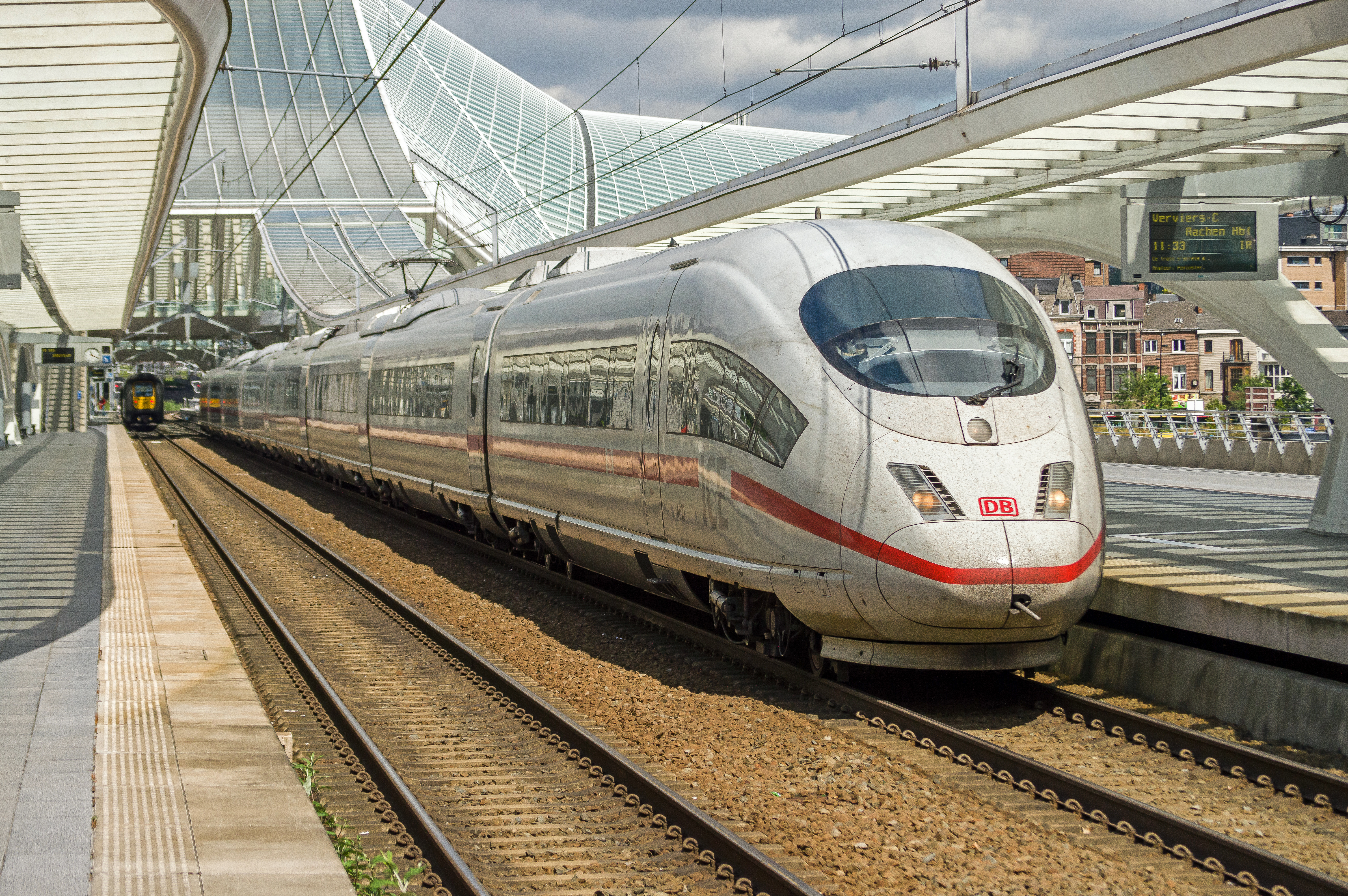 Het modernste station van België Liège-Guillemins. Hier het vertrek van ICE 3M 4610 naar Köln - Frankfurt Main.